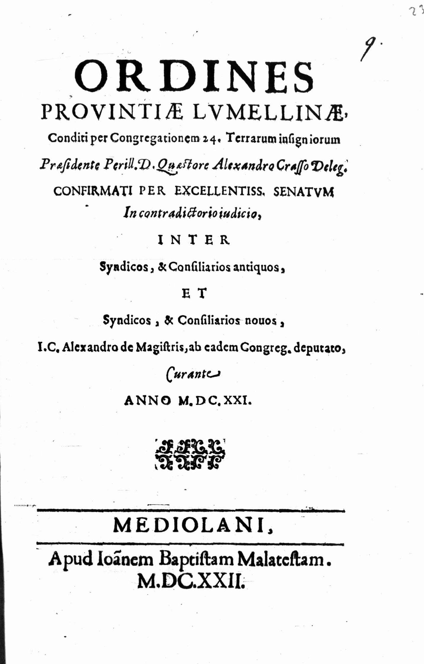 Frontespizio